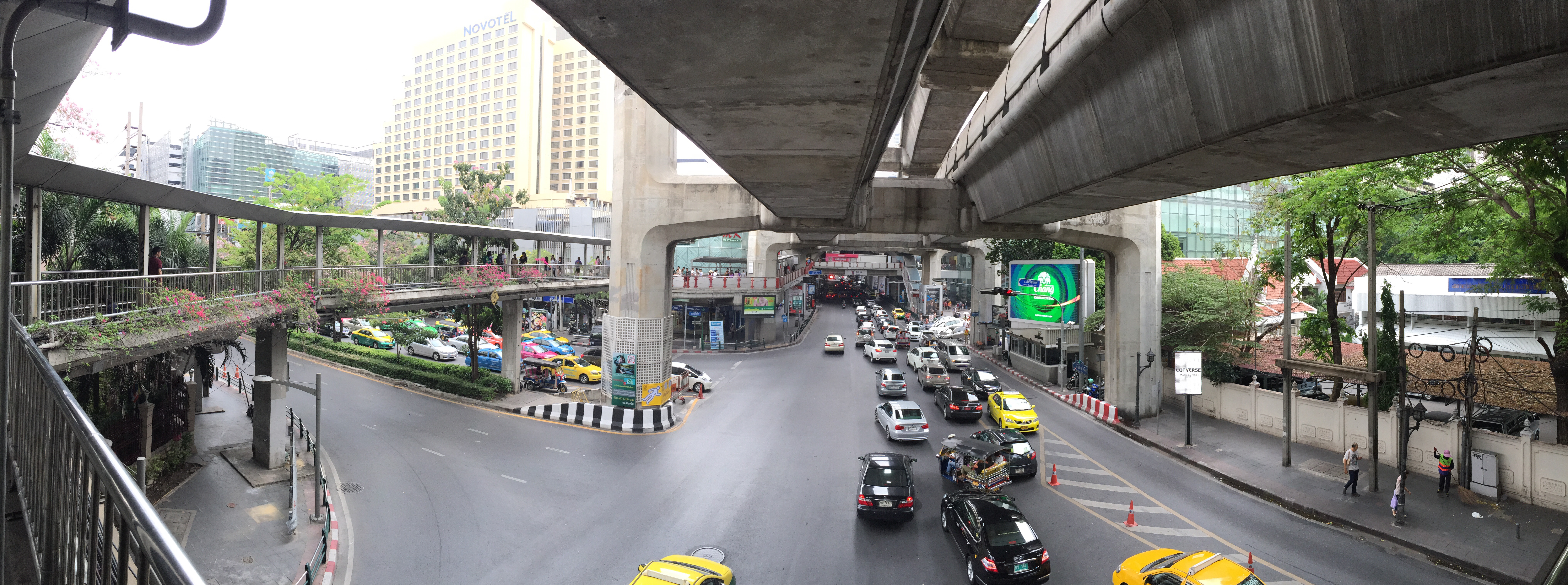 Pathum Wan, Bangkok 10330, Thailand